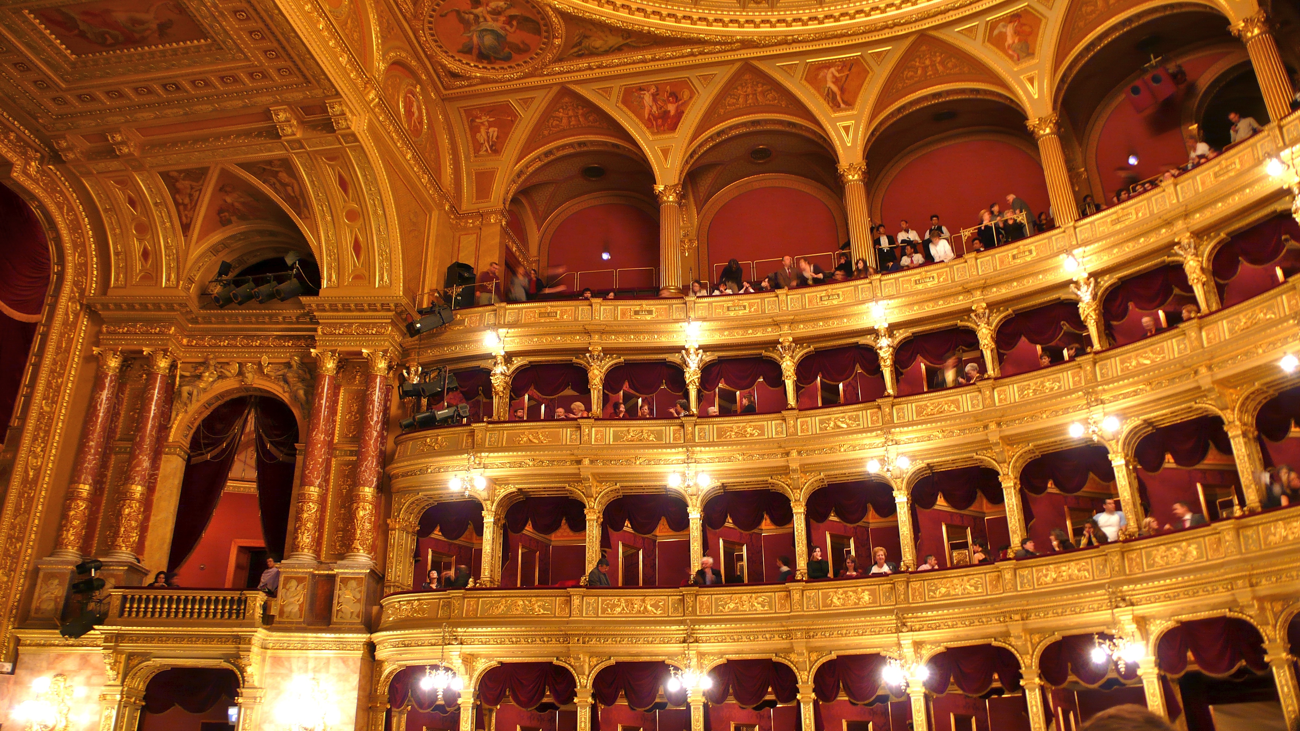 Teatro dell'Opera